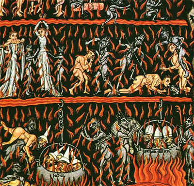 Ilustrasi : Neraka menurut ajaran Agama Yahudi